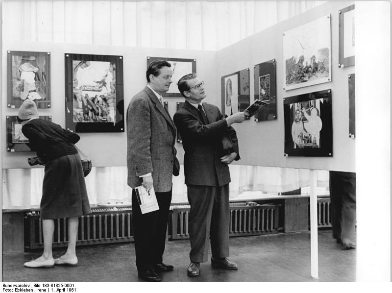 Zentralbild Eckleben 1.4.1961 Adolf Hoffmeister Ausstellung eröffnet Im Im Berliner Haus der tschechoslowakischen Kultur, wurde am 30.3.61 eine Ausstellung mit Illustrationen aus Karikaturen des tschechoslowakischen Künstlers Adolf Hoffmeister eröffnet. UBz: Blick in die Ausstellung im CSSR-Pavillon in Berlin.